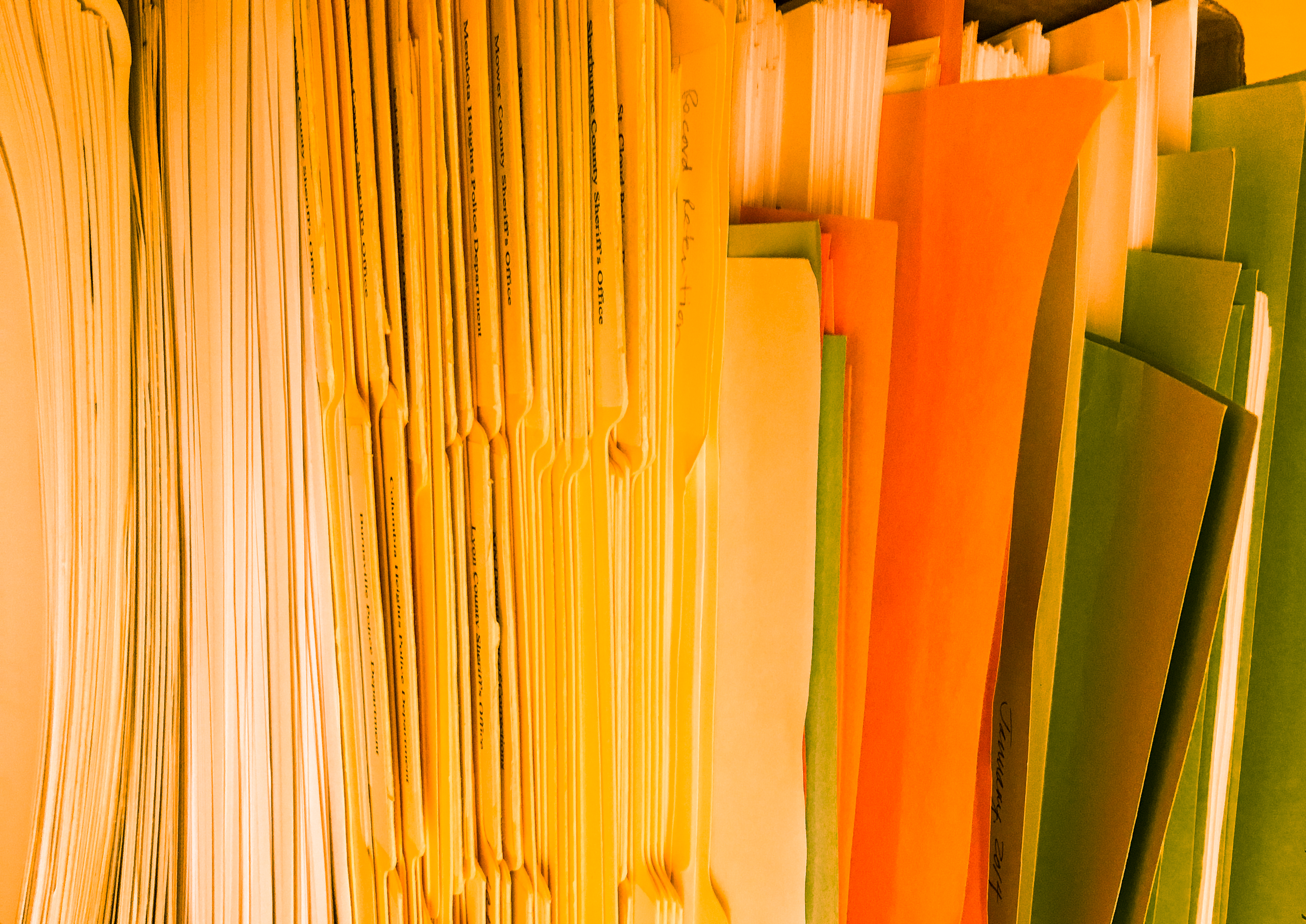 Documents